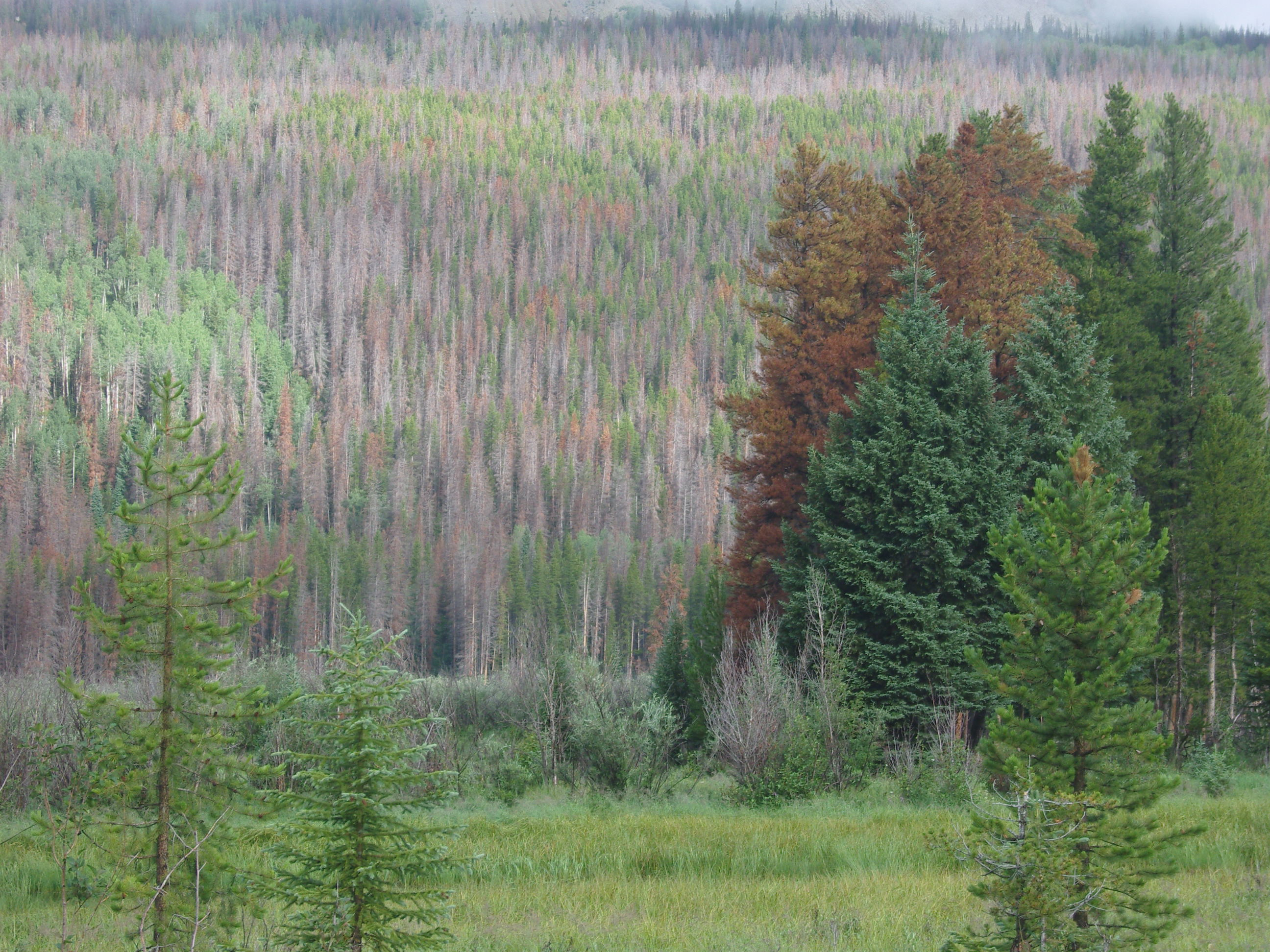 Blick vom Timber Creek Campground auf ca. 2.720 m Höhe in den Wald